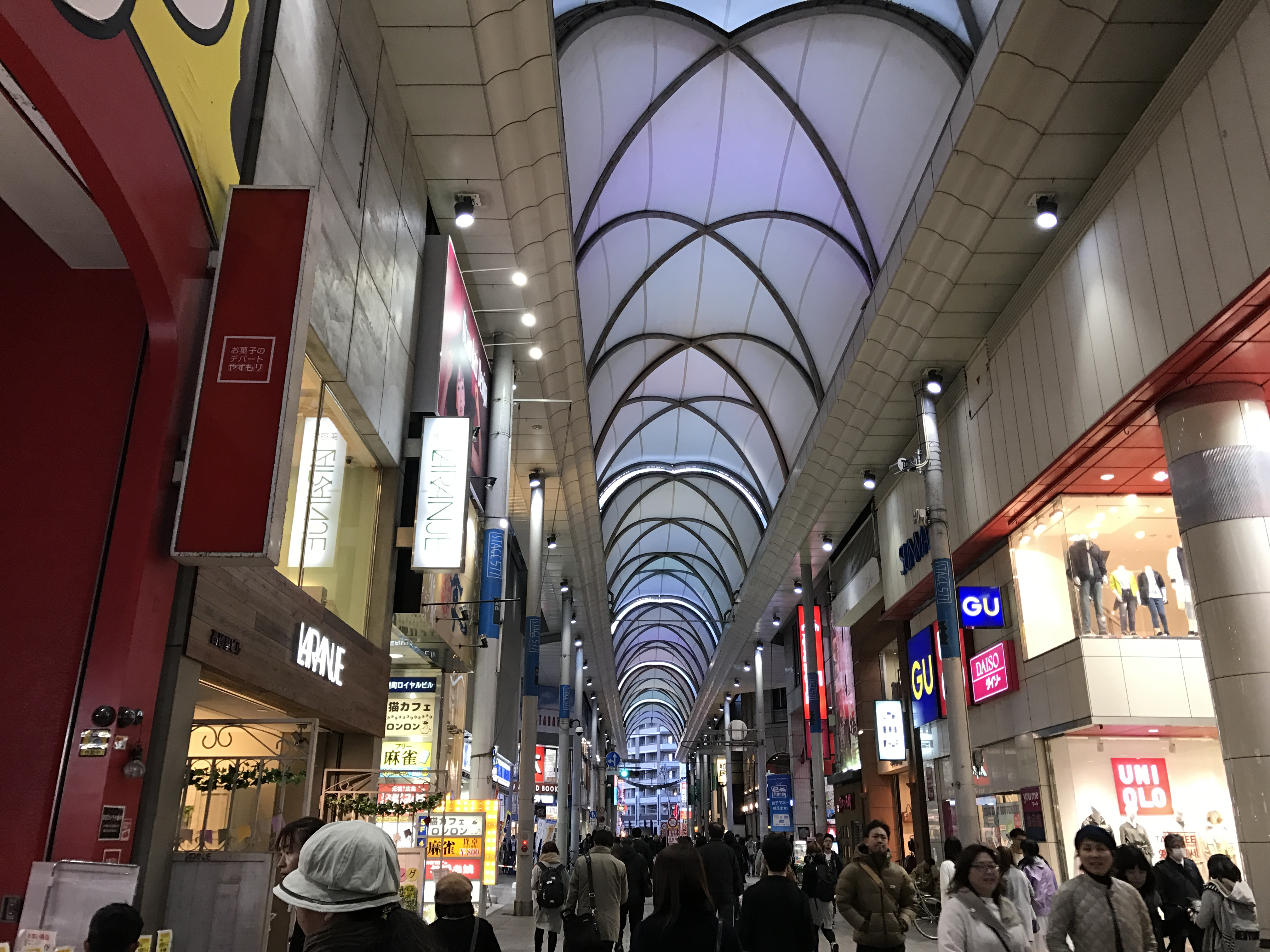 広島本通り商店街